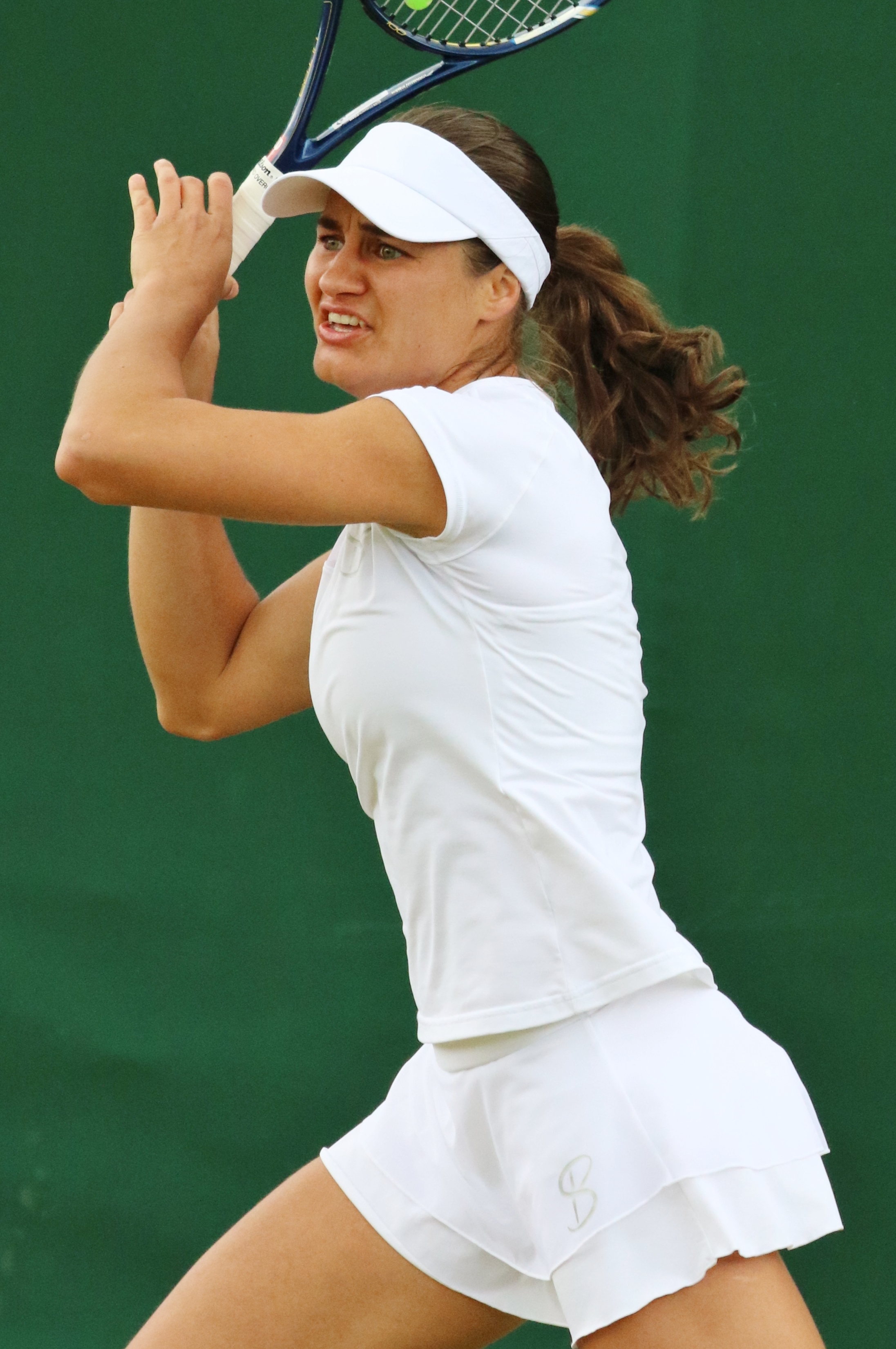 Niculescu WM16 (39)